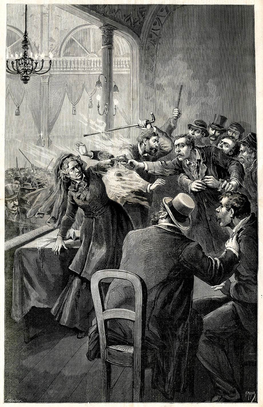 gravure représentant l'attentat contre Louise Michel pendant une conférence au Havre en 1888